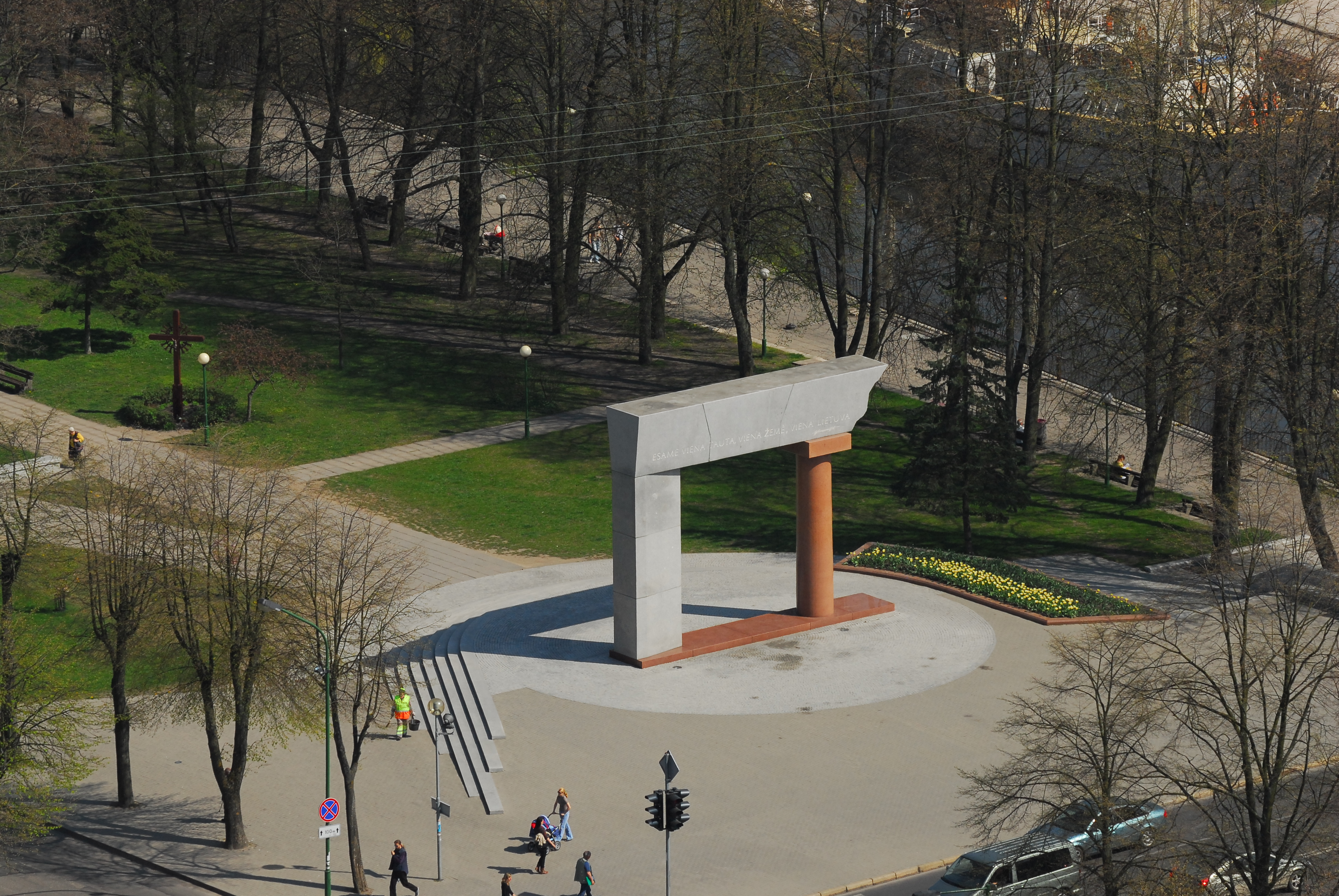 Památník "Arka" ("Oblouk") byl postaven (architekt: Arūnas Sakalauskas) v Klaipėdě, několik metrů od mostu "Biržos tiltas" v roce 2003 k příležitosti těchto výročí: 80 let od Klaipėdského povstání 15. 1. 1923, jehož výsledkem bylo připojení Klaipėdského kraje (Memelland náležel Východnímu Prusku, Německu, v době povstání francouzský protektorát) k Litvě; a 85. výročí Tilžėnskéko aktu. Památník "Arka" váží 150 tun a je vysoký 8,5 m. Menší kolona z rudé žuly symbolizuje Malou Litvu a její kulturní dědictví, zbytek ze šedé žuly - "Velkou" Litvu. Jakoby odlomená část z vrchní části symbolizuje část Malé Litvy v Kaliningradské oblasti Ruska + ještě menší území na východě dnešního Polska. Nahoře jsou vytesána slova Ievy Simonaitytė: „Esame viena tauta, viena žemė, viena Lietuva“ (Jsme jeden národ, jedna země, jedna Litva). Pohled přes ulici H. Manto g., t. j. směrem k východu, proti proudu Danė. Letecký snímek